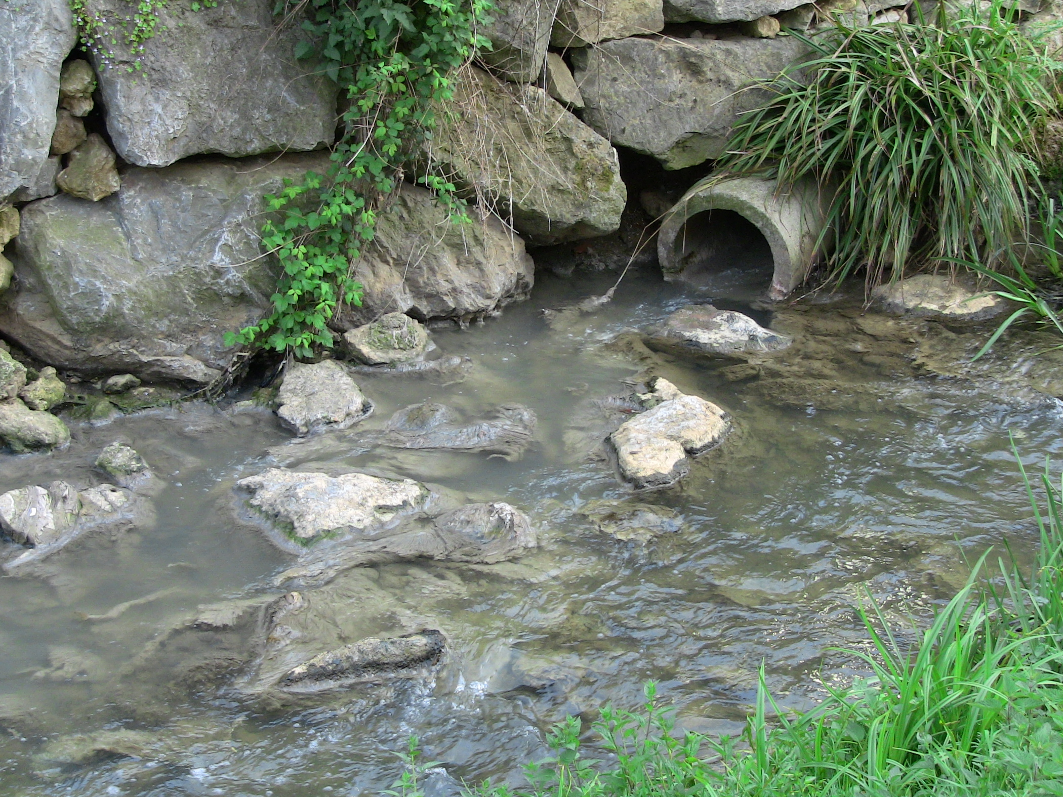 Río Viao a su paso por Nava